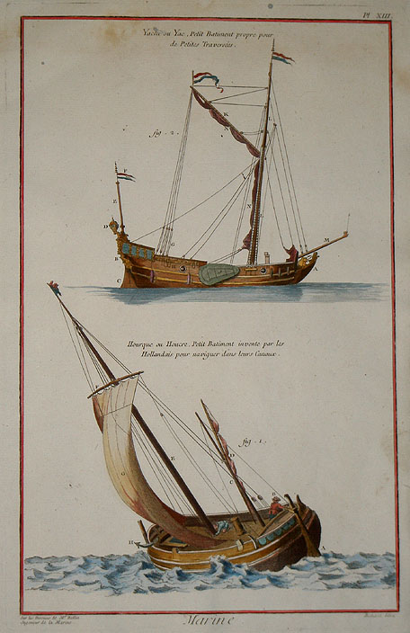 Marine. Yacht ou Yac, Petit Batiment propre pour de Petites Traversées; Hourque ou Houcre, Petit Batiment inventé par les Hollandais, pour naviguer dans leurs Caneaux.